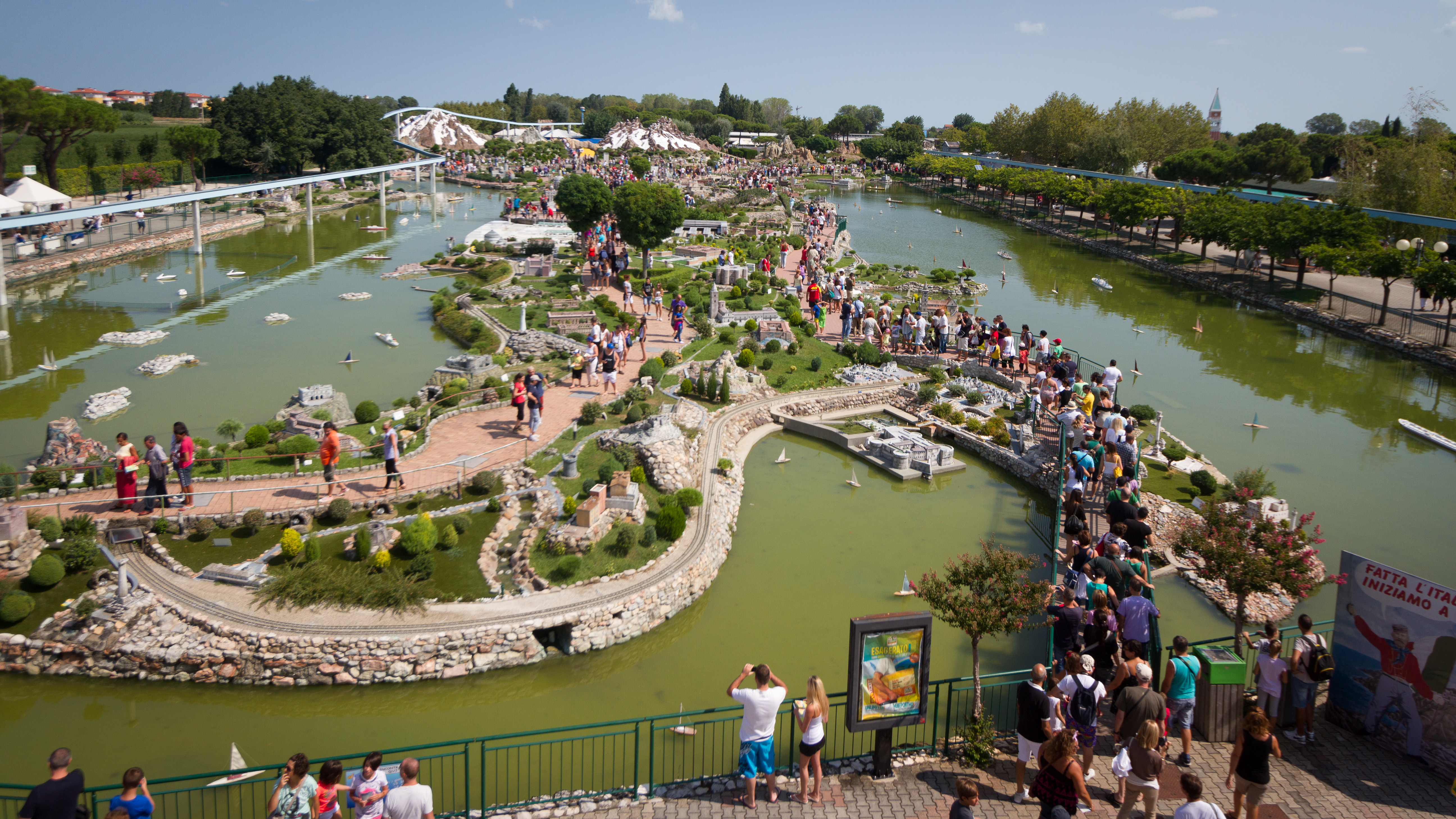 Veduta del parco "Italia in miniatura" di Viserba, RI.